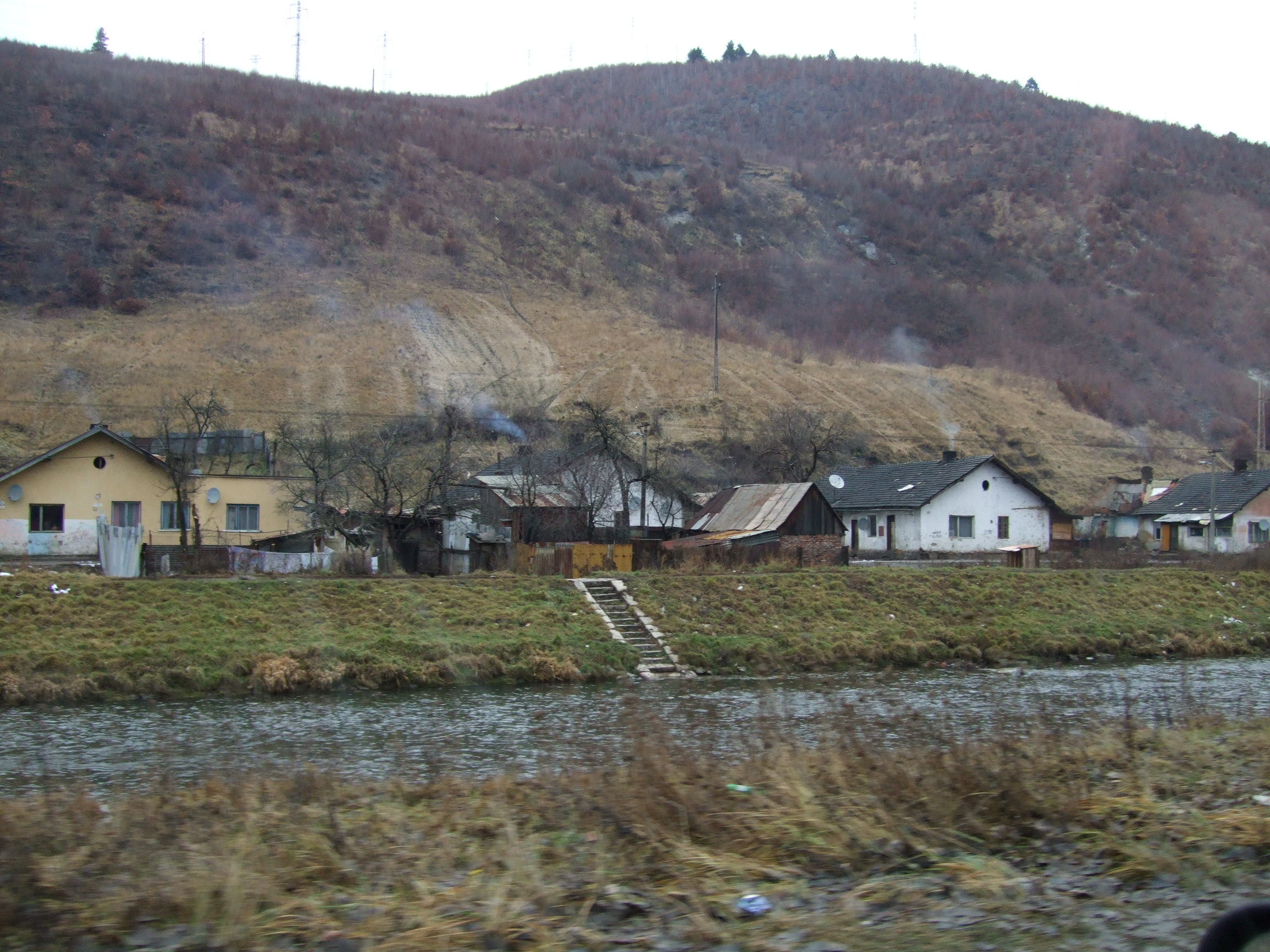 Hornádska kolónia